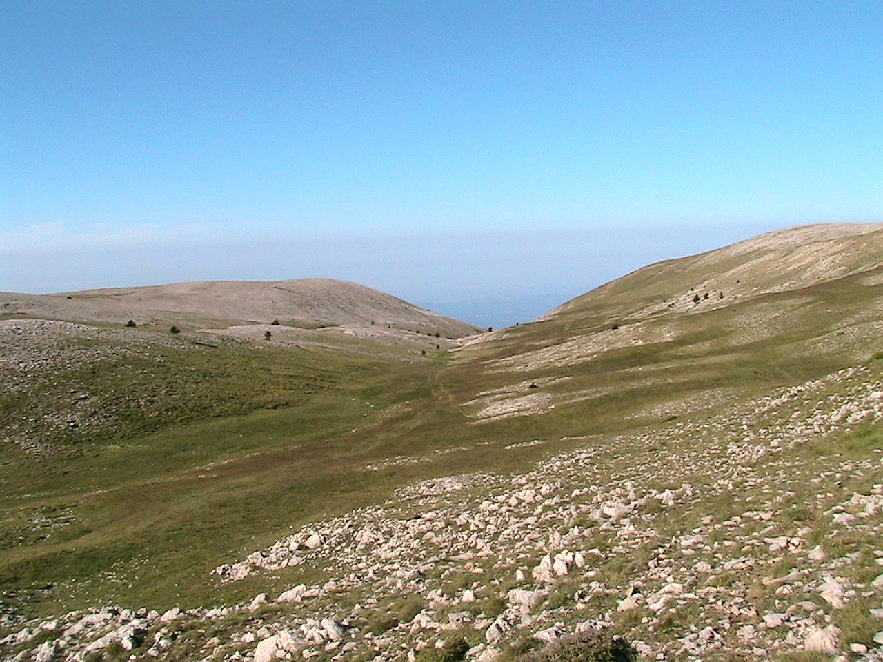 La Coma de la Comtessa, a la serra del Port del Comte, al sud del Pedró dels Quatre Batlles. A Odèn (Solsonès - Catalunya) This is a a photo of a natural area in Catalonia, Spain, with id: ES510196